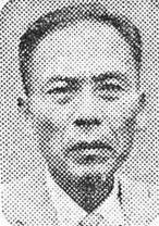 박제환, 농림부장관, 국회의원